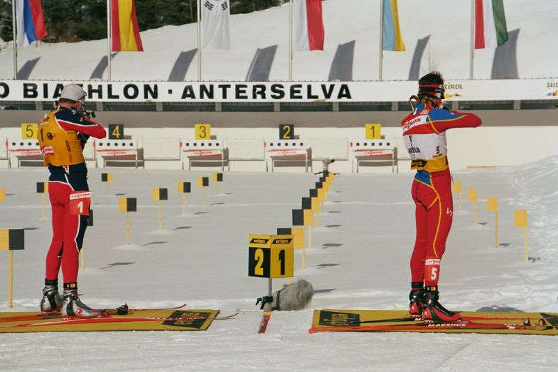 Raphael Poiree und Ole Einer Björndalen beim Massenstart des Biathlon-Weltcuprennens 2006 in Antholz